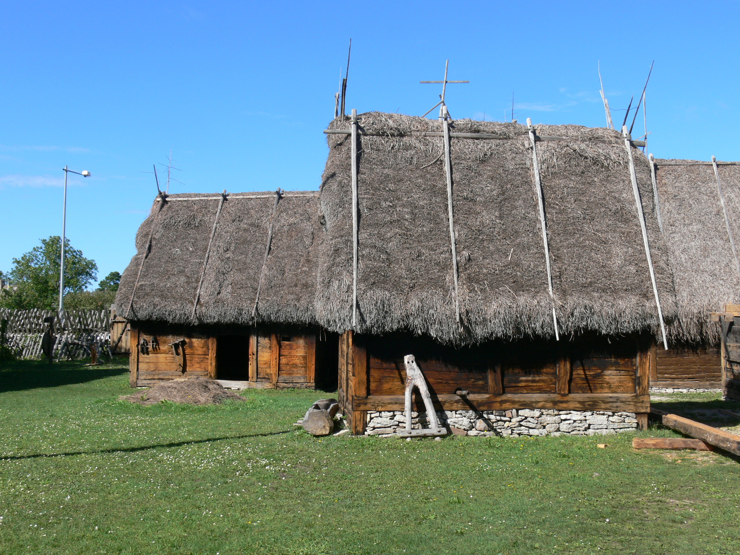 Bunge Museum auf Gotland. Hof ( 17.Jhdt. ): Stallgebäude